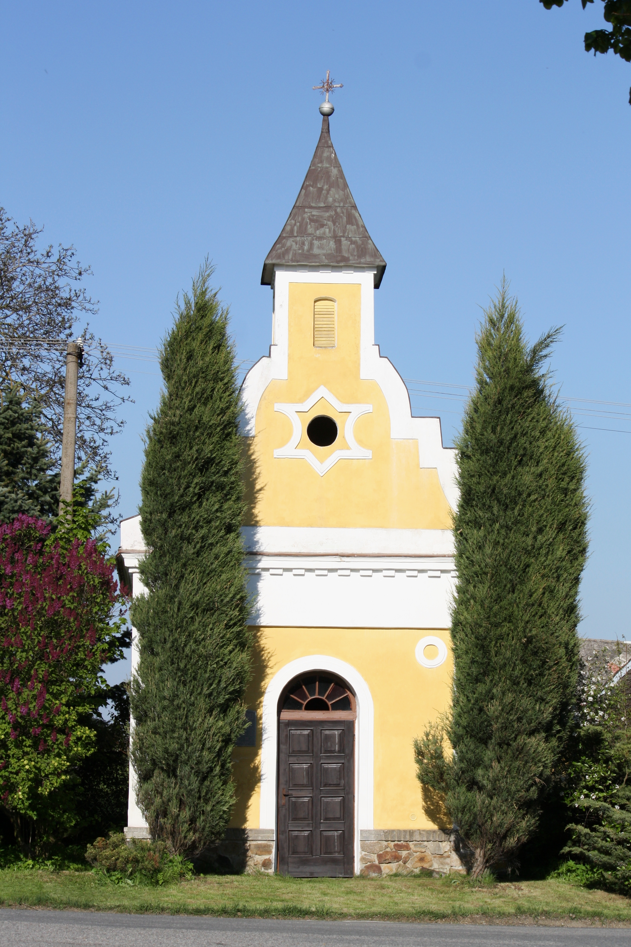 Čáslavsko - kaplička na návsi